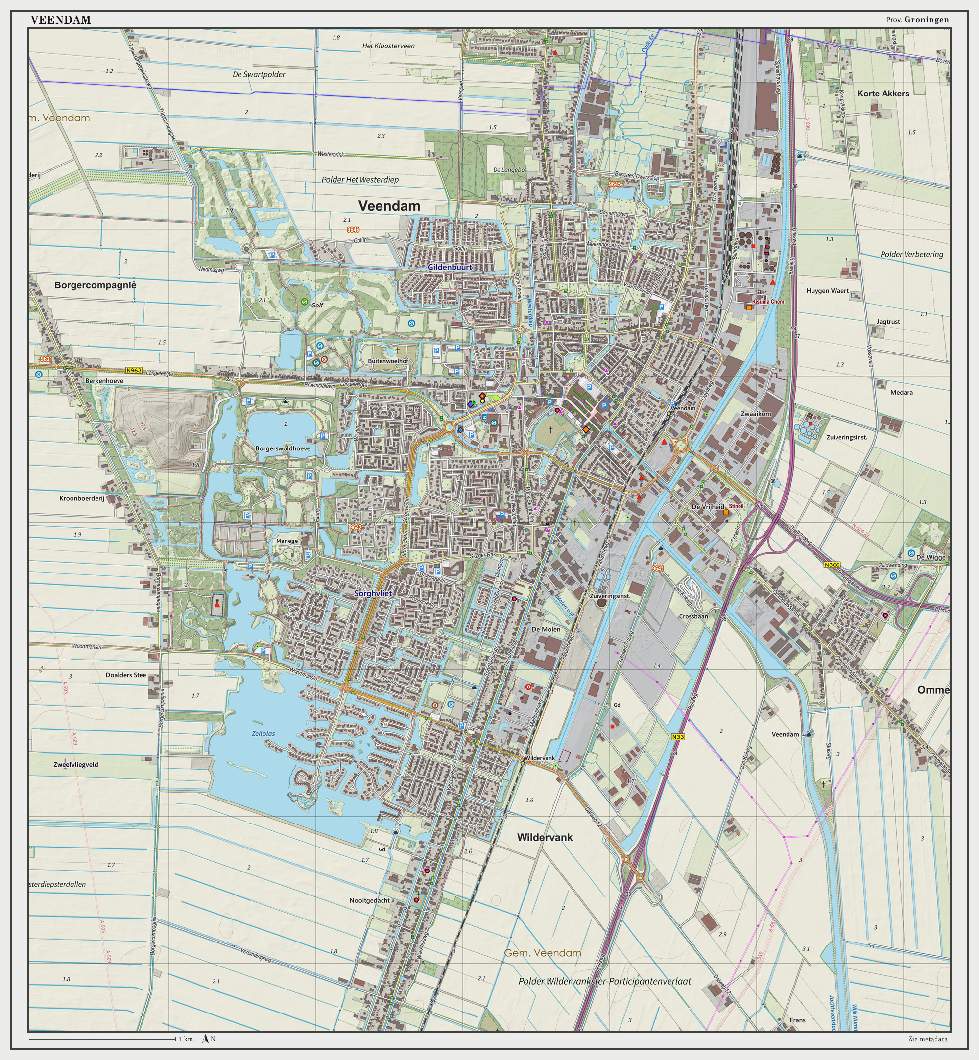 Topografische kaart van Veendam (woonplaats). Resolutie: 300 pixels/km. Kaartbeeld samengesteld uit de open geodata van de Top10NL en Top25namen (Basisregistratie Topografie, Kadaster), Creative Commons BY licentie. Gebouwvlakken uit open geodata BAG extract. Wegen uit de OpenStreetMap. Reliëfschaduw uit de Actuele Hoogtekaart AHN2. Samenstelling en kleurenschema: Jan-Willem van Aalst, met QGIS2. Zie ook de Legenda.